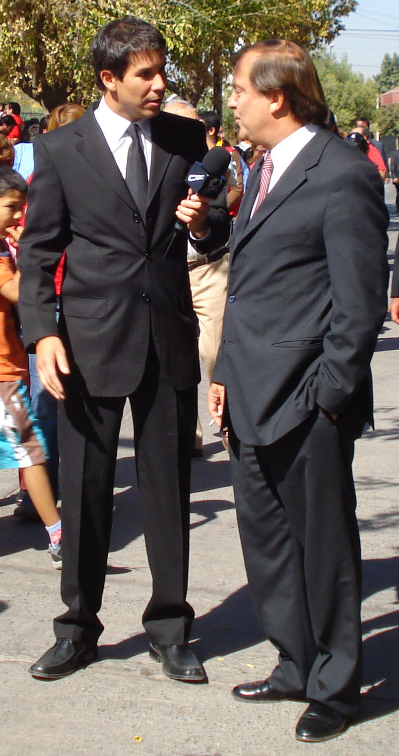 El periodista Gonzalo Feito entrevista al Ministro Francisco Vidal, para el programa CQC Chile.